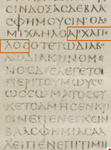 Es un fragmento del libro de la carta de Judas , Versiculo 9